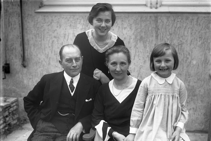 Silberhochzeit im Hause des Reichsaussenministers Dr. Curtius! Das Silberpaar mit ihren beiden Töchtern.